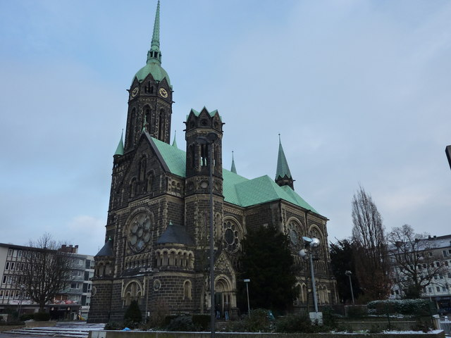 MG - Rheydt. Marktplatz und evangelische Hauptkirche.